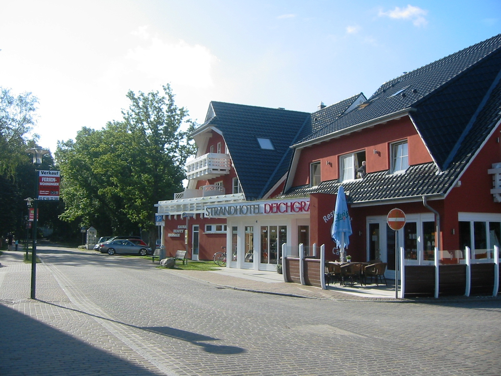 Graal-Müritz, Strandstraße